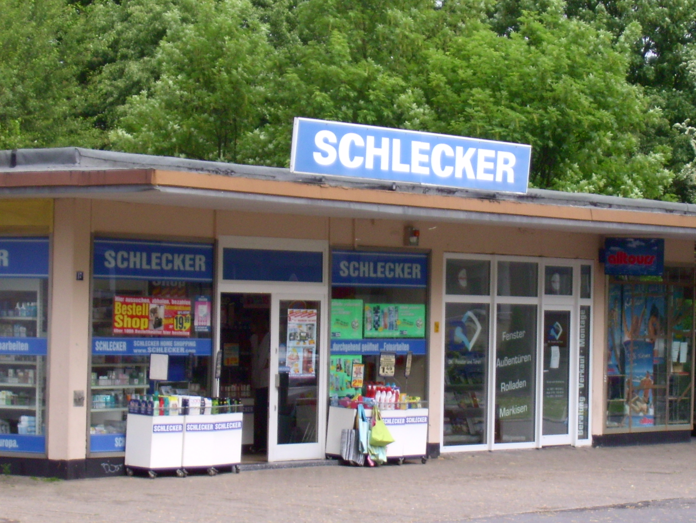 Schlecker-Filiale in Dortmund-Lanstrop, selbst geknipst